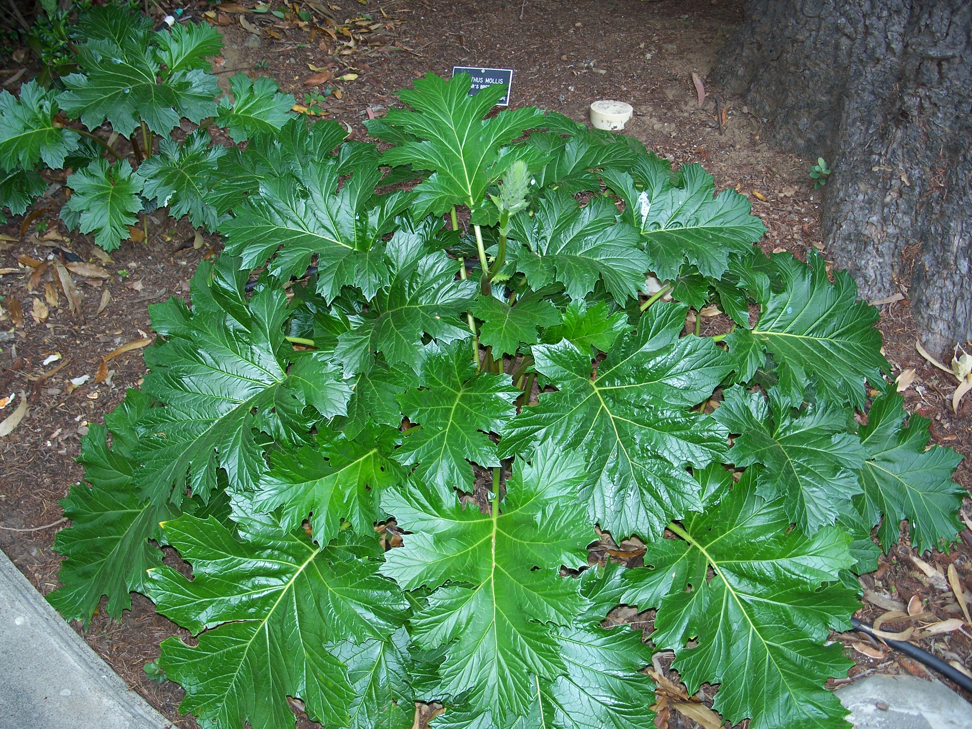 Acanthus mollis Made in Villa Montalvo botanical garden in Saratoga, California. Identified by Franz Xaver.